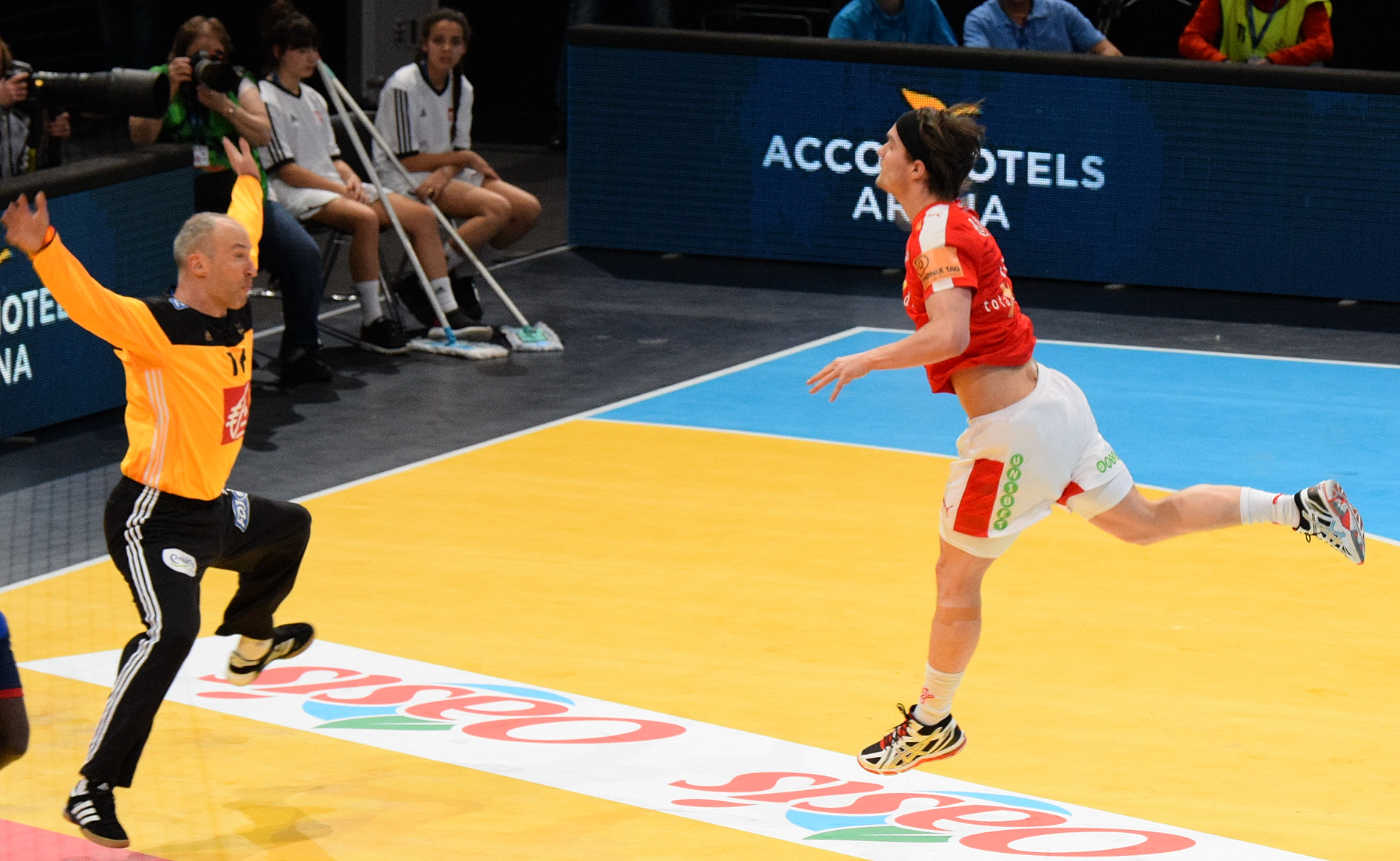 Le 10 janvier 2016 lors du match France / Danemark durant la Golden League à l'AccorHotels Arena (Paris).